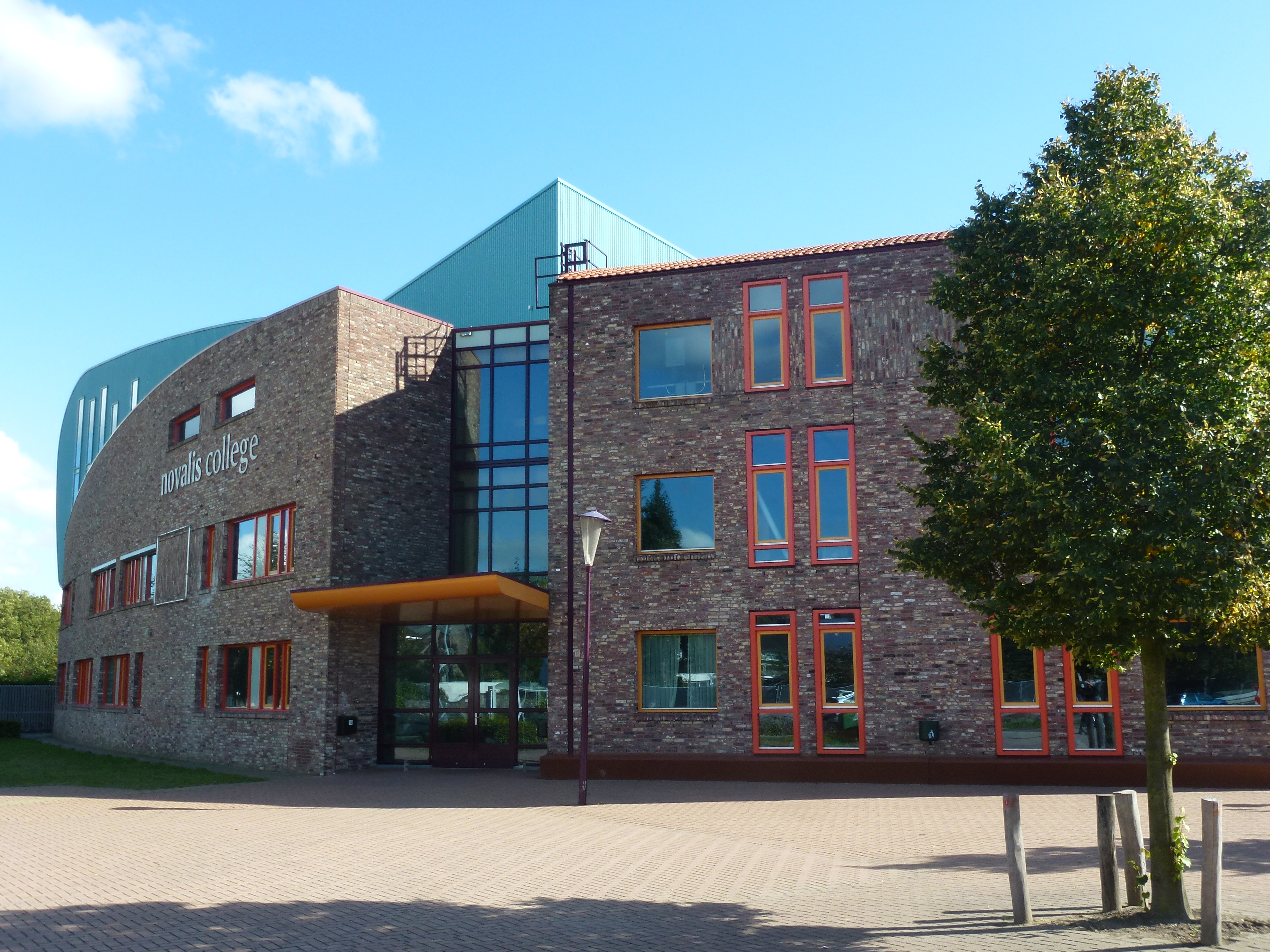 Novaliscollege Eindhoven